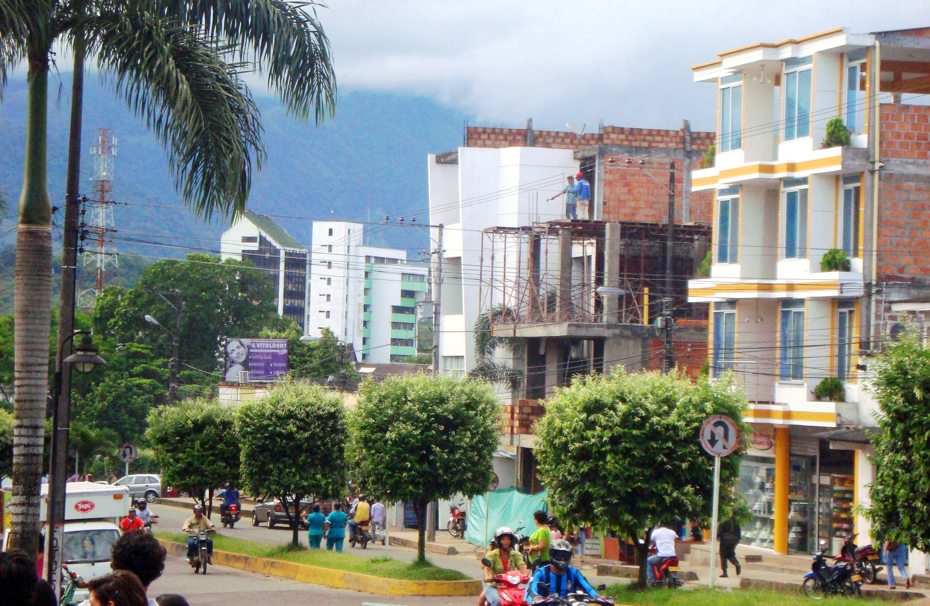 Av. Paseo de los Fundadores desde el barrio Juan XXIII hacia el centro de la ciudad de Florencia (Caquetá).